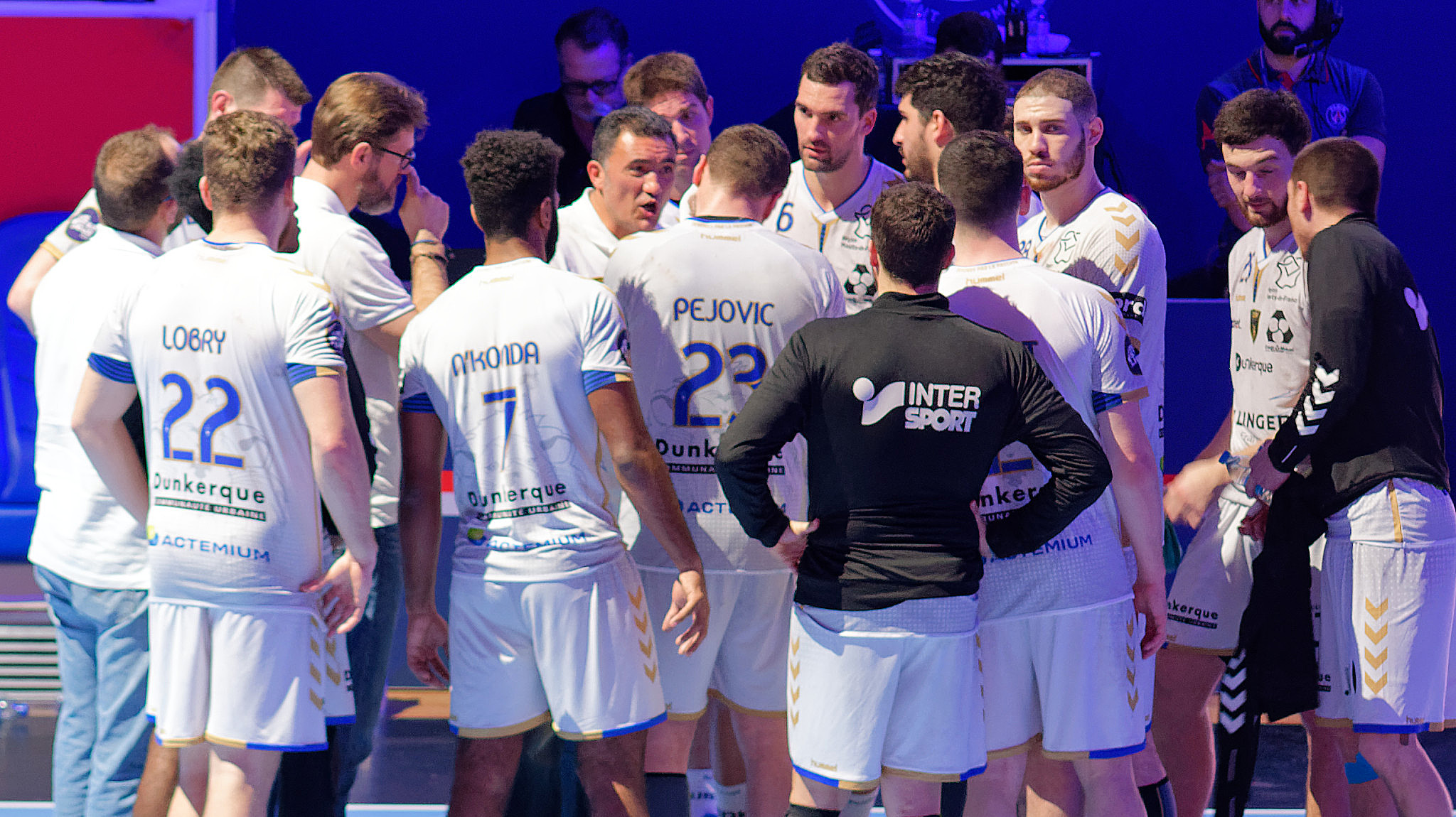 Rencontre de LidlStarligue entre le PSG et l'S Dunkerque. A Coubertin, le 08 mars 2017.